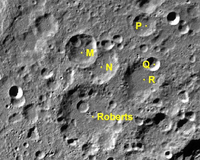 Cráter lunar Roberts. Cráteres satélite. (Imagen LRO)